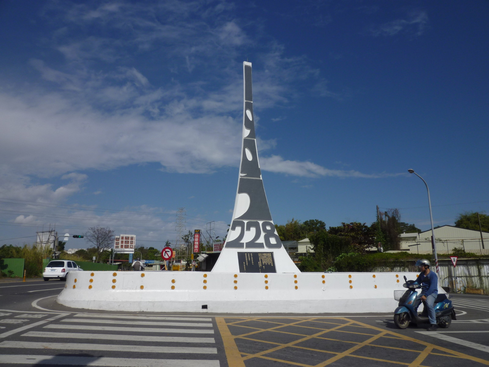 中文（台灣）: 嘉義市彌陀路二二八紀念碑。